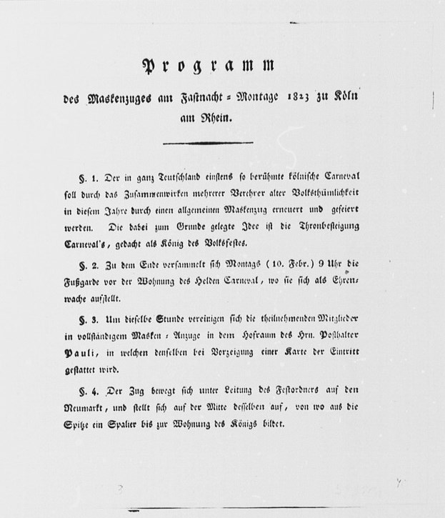 Foto: Programm des ersten Kölner Rosenmontagszuges am 10. Februar 1823